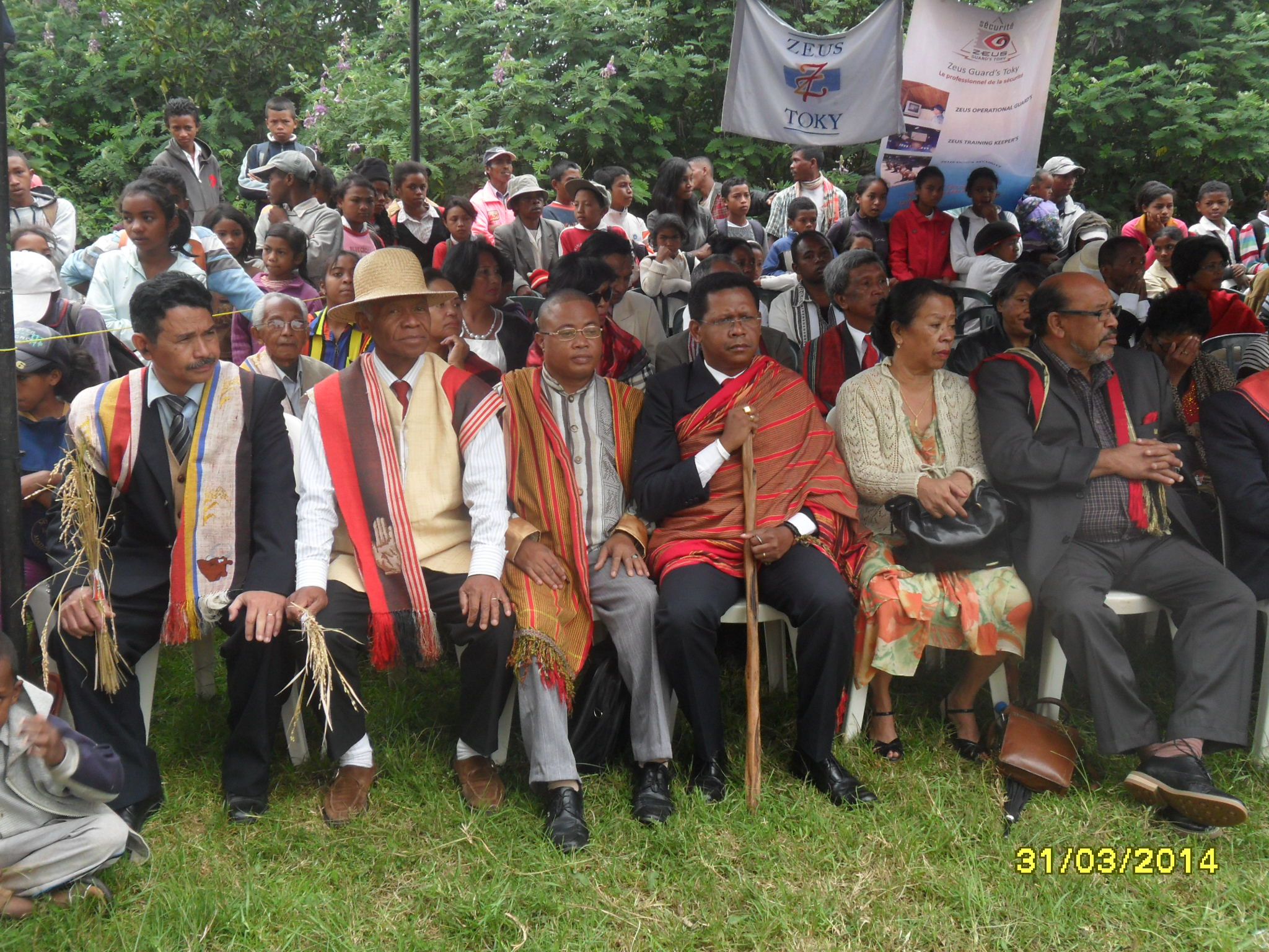 Des autorités traditionnelles participant à la célébration du nouvel an malgache à Ambohidrabiby le 20 mars 2015 Malagasy: Raiamandreny aradrazana mankalaza ny taombaovao malagasy tao Ambohidrabiby